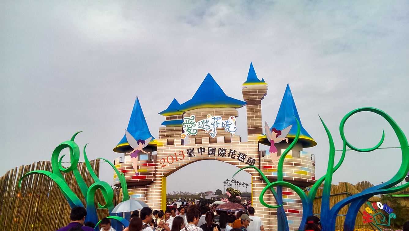 2013年新社花海-臺中國際花毯節